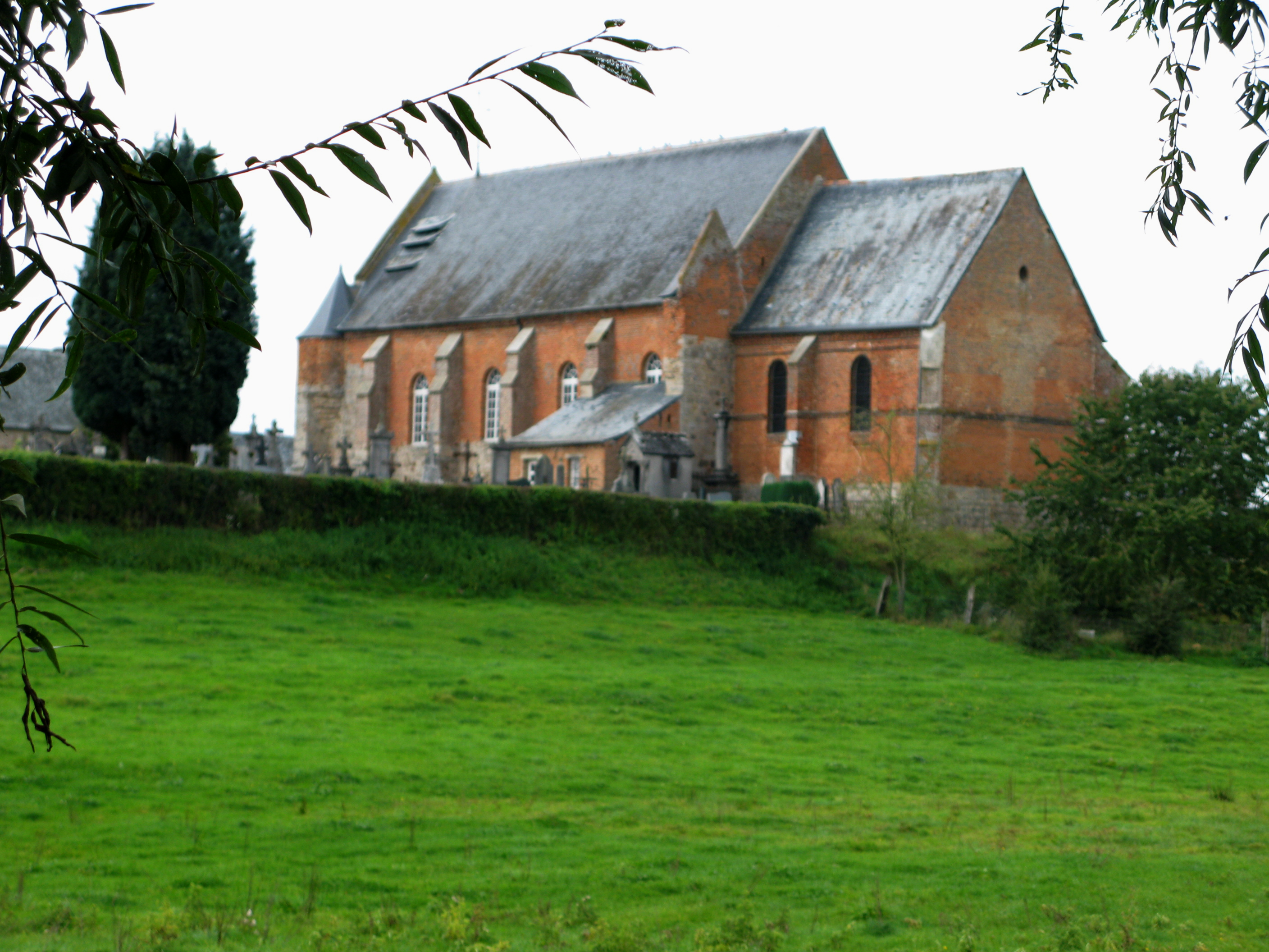 Marly-Gomont (Aisne, France) - La façade Sud de l'église fortifiée. .